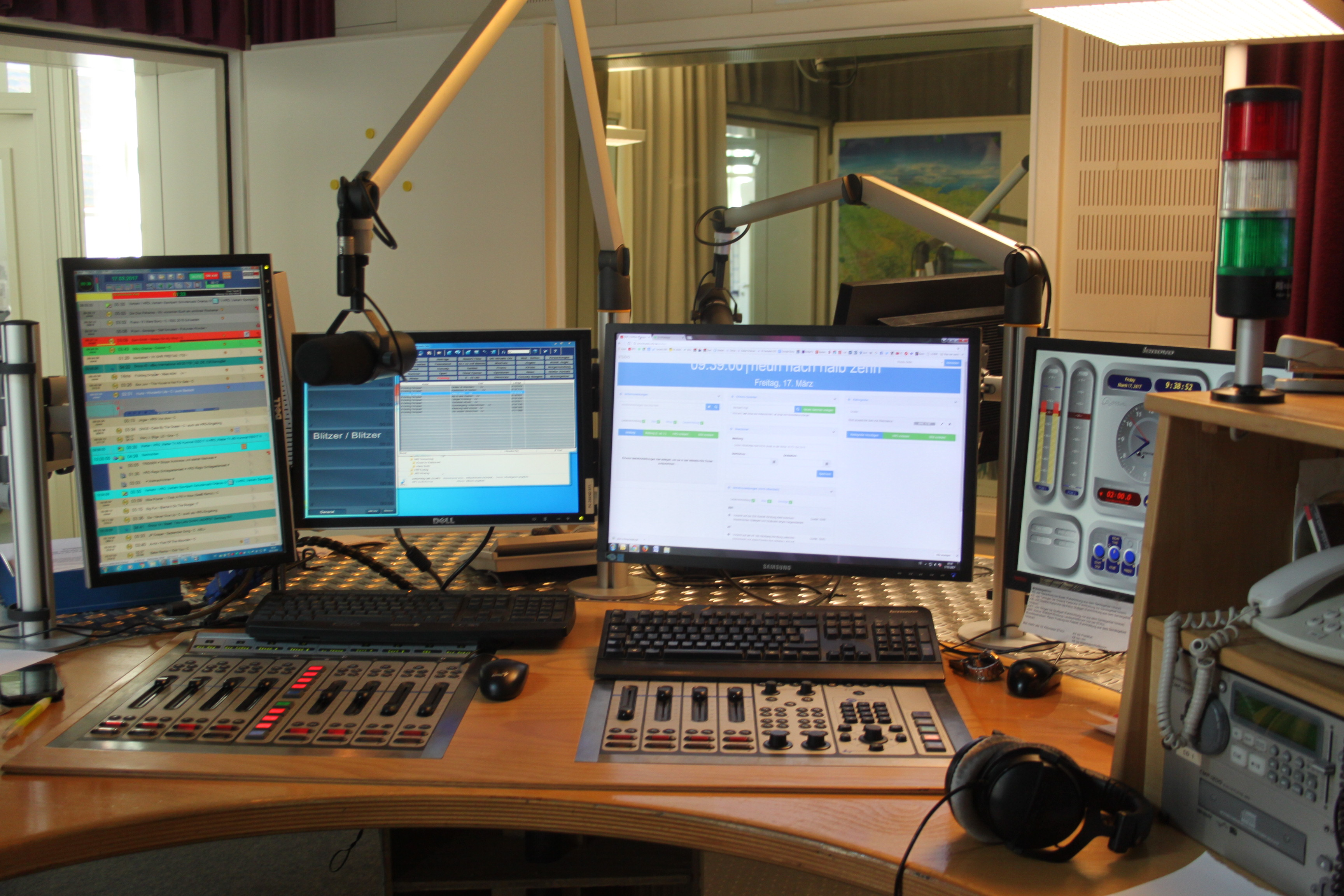 Schwarzwaldradio Studio